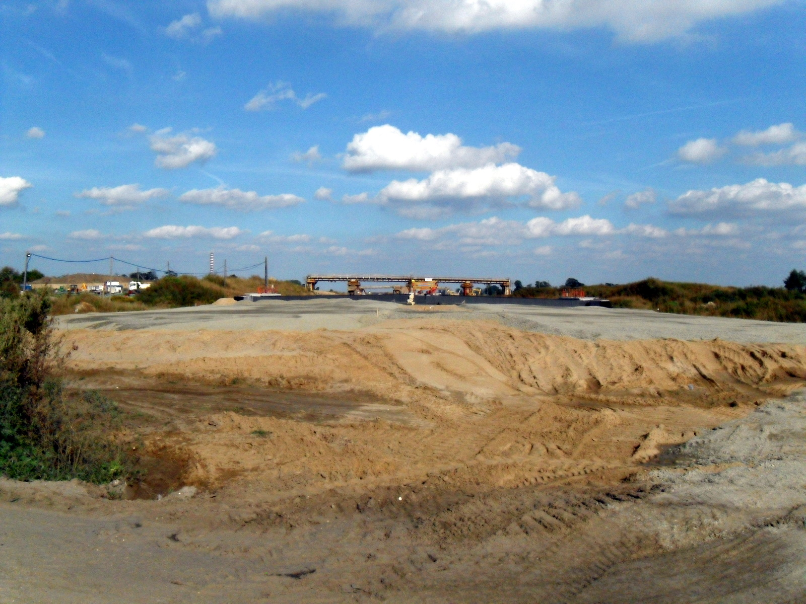 Budowa autostrady A2 w Kotowicach